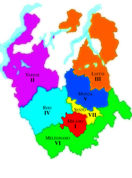 La mappa dell'Arcidiocesi Metropolitana di Milano